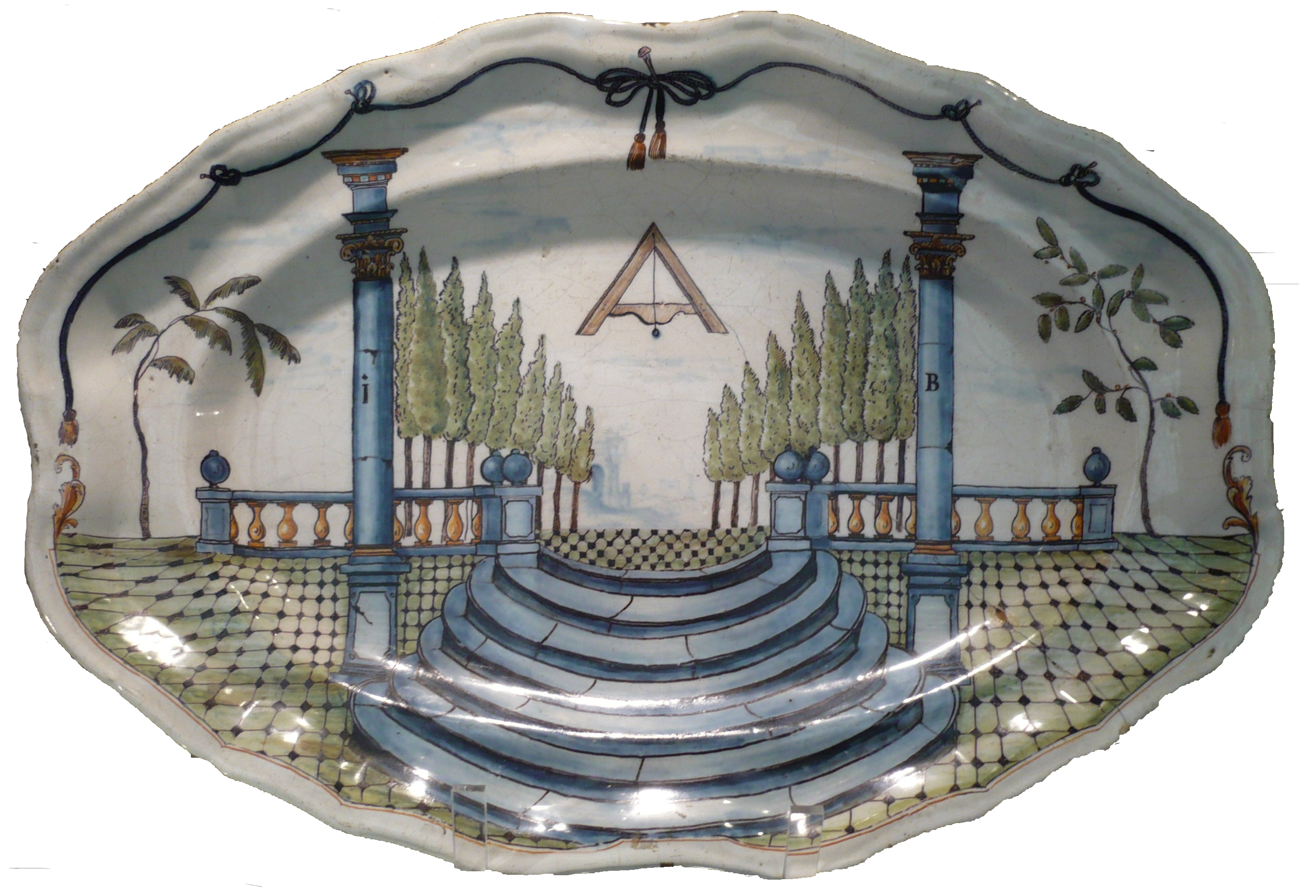 Plat en faïence au décor maçonnique,Lyon, France, XVIIIème siècle. L'objet original se trouve au musée de la Grande Loge de France, Paris, France.